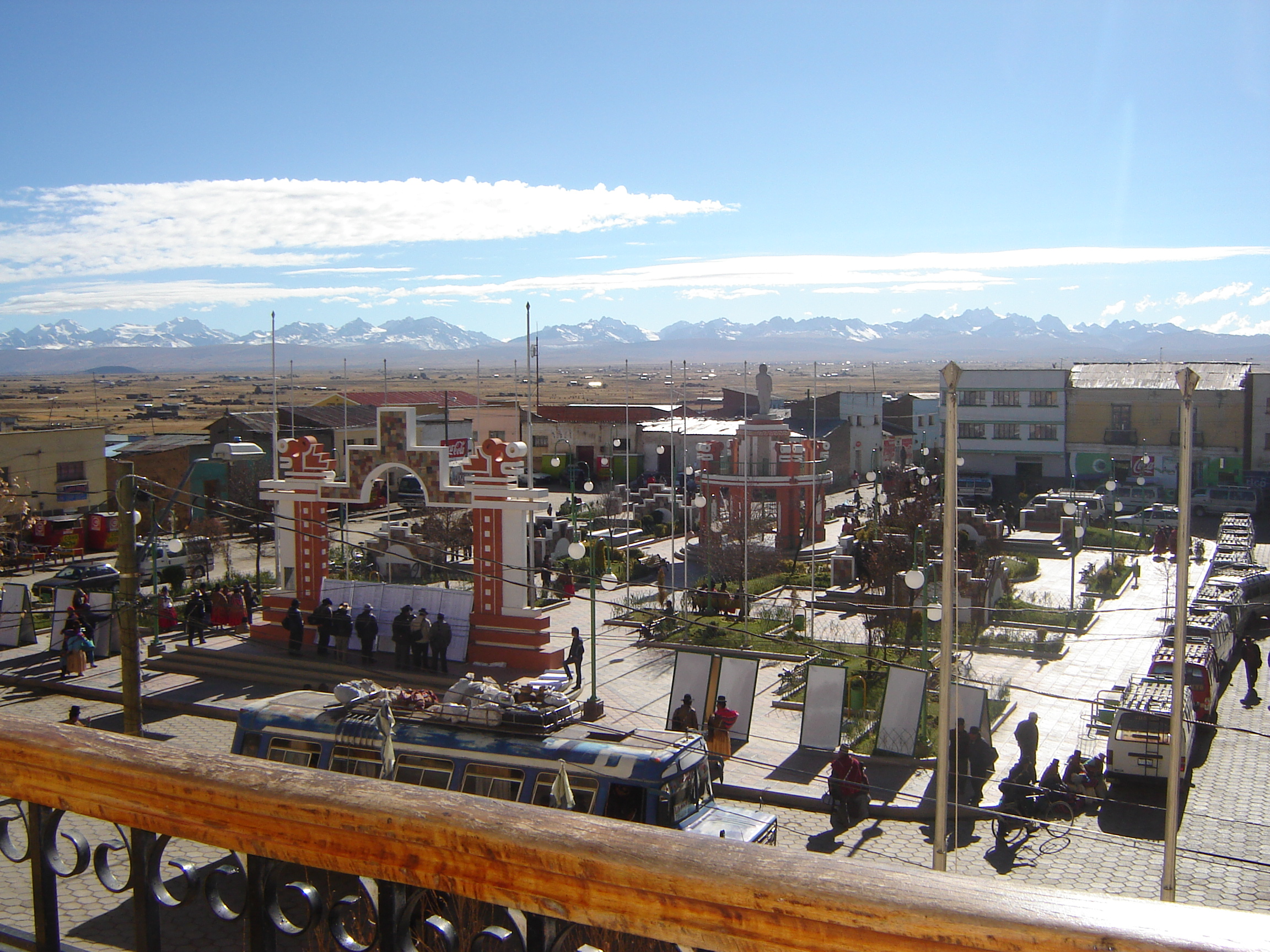 Aymar aru: Akax Franz Tamayo Pukaran Plasawa/ La Plaza de Pucarani.